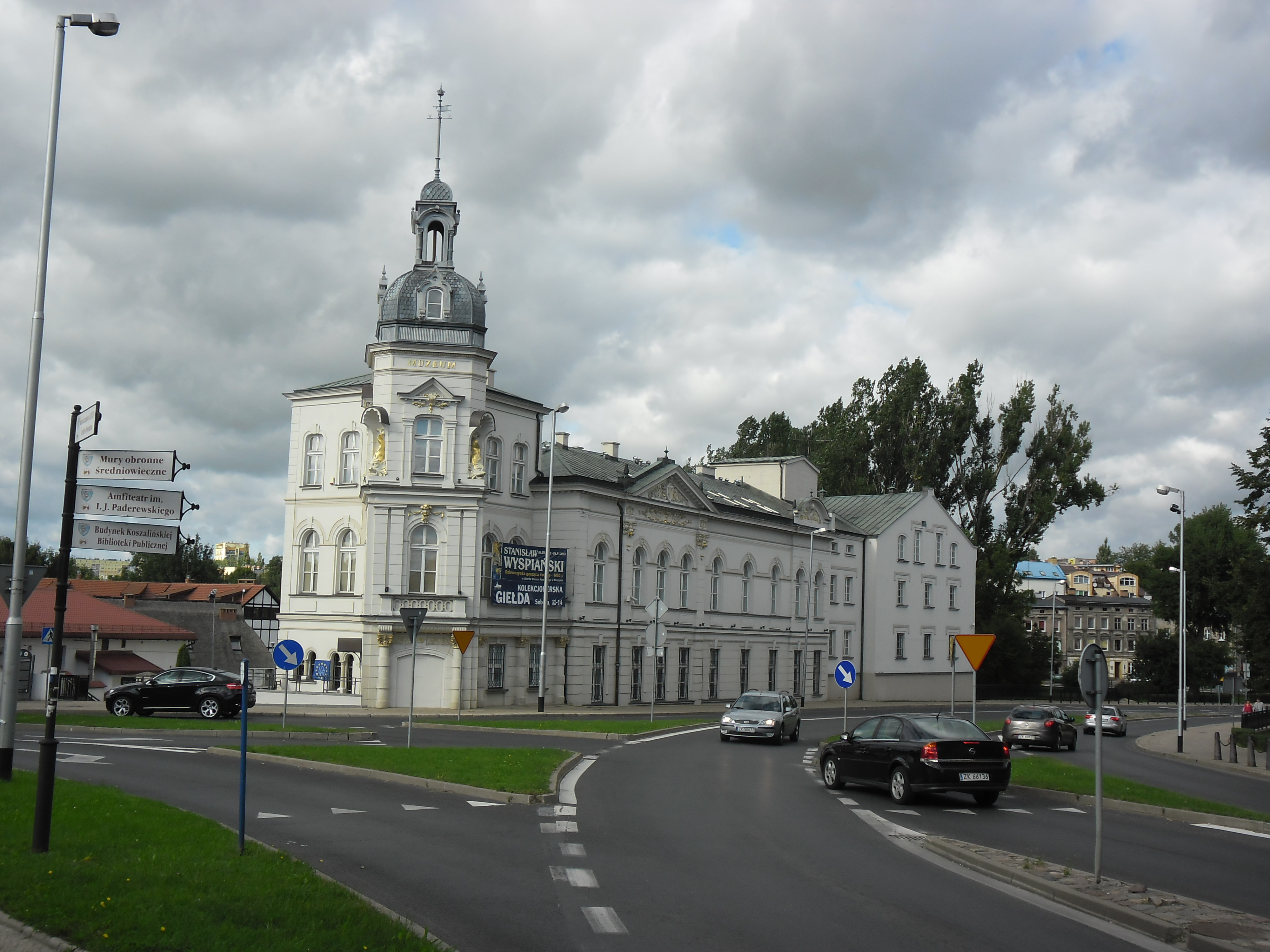 Koszalin, ul. Młyńska 37/39 - zespół młyna miejskiego: młyn, kamienica (obecnie Muzeum w Koszalinie)